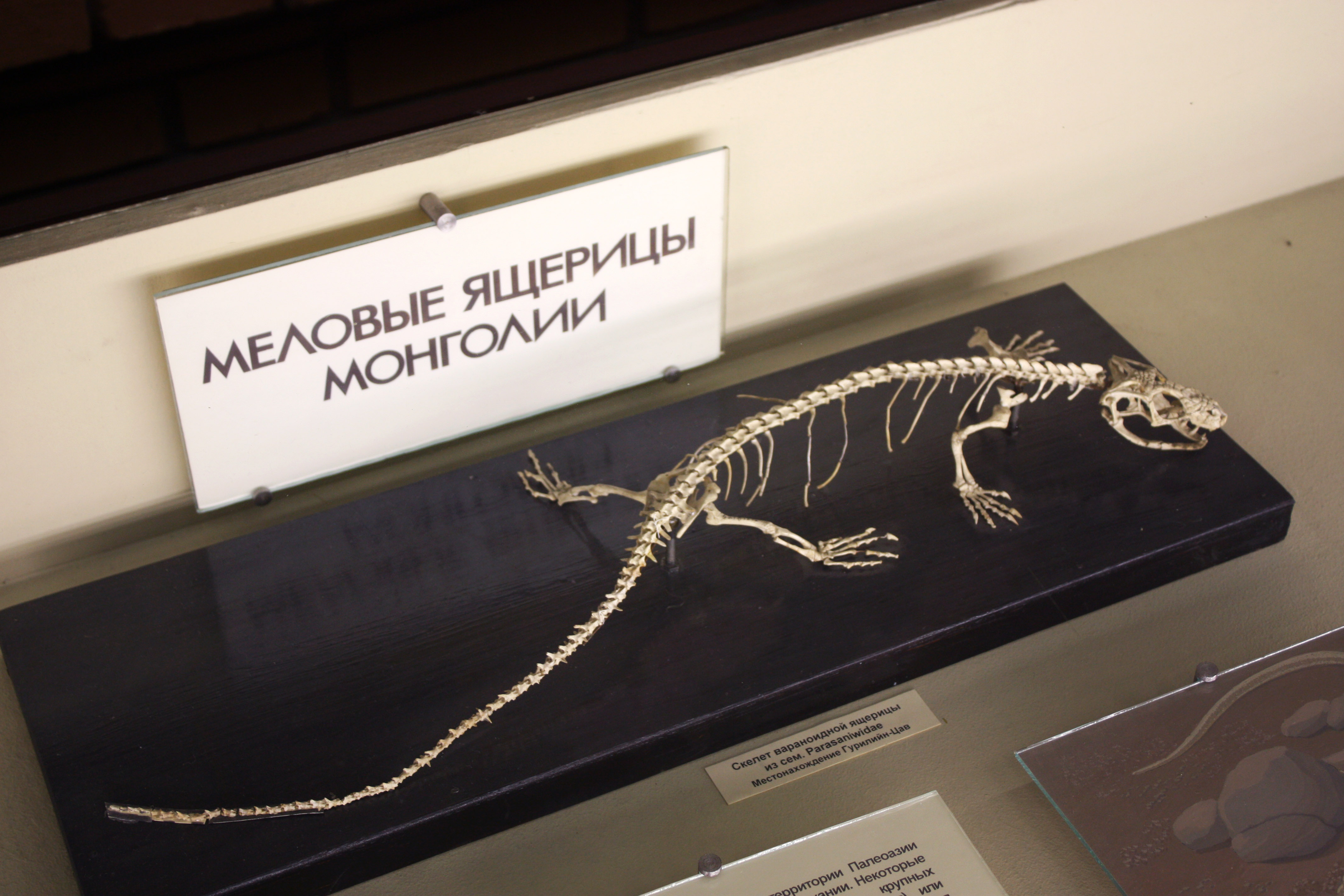 A Parasaniwid (Necrosauridae) from Mongolia